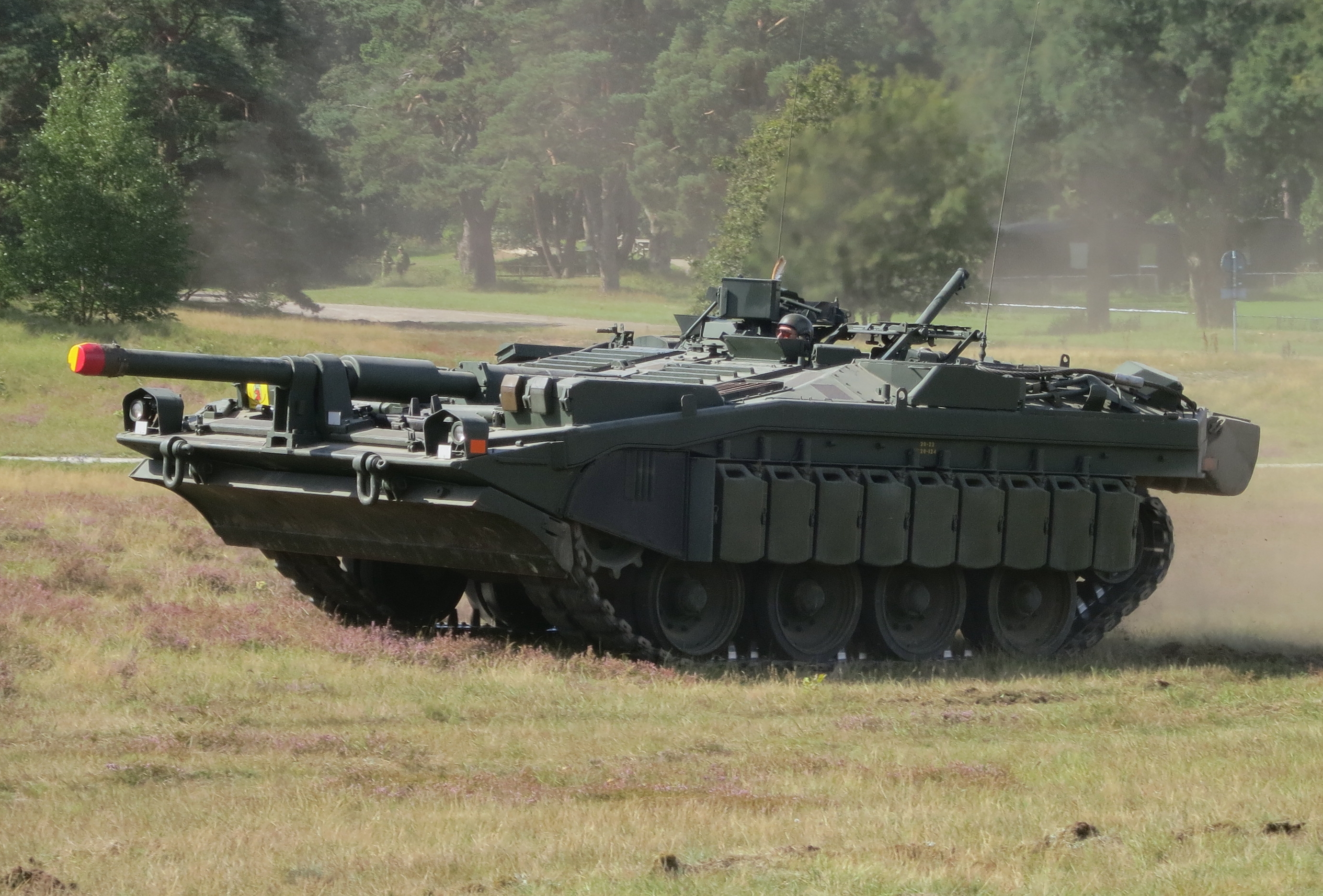 Stridsvagn 103 (Stridsvagn S) vid Regementets Dag på P7 Revingehed